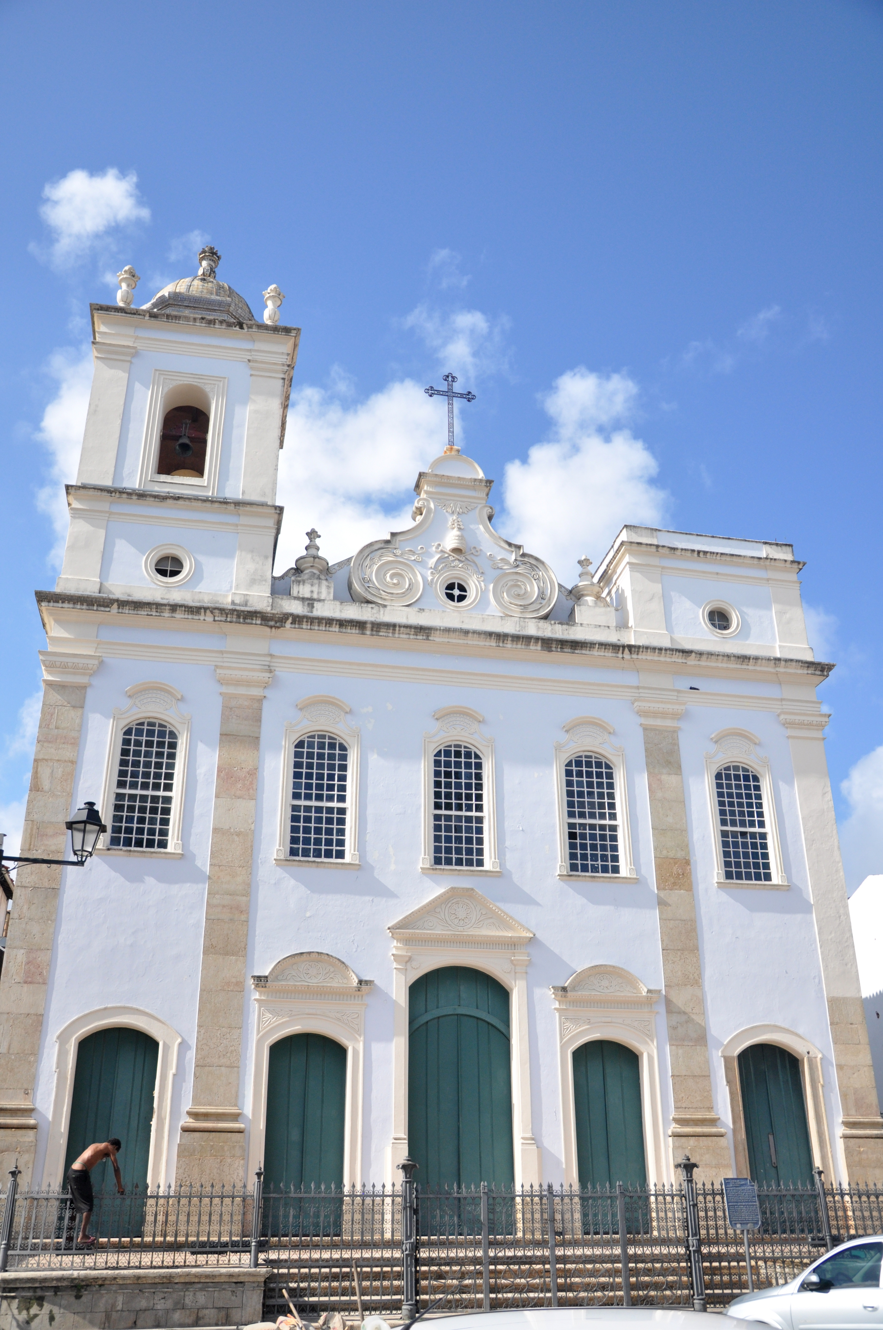 São Pedro dos Clérigos Foto Tereza Torres